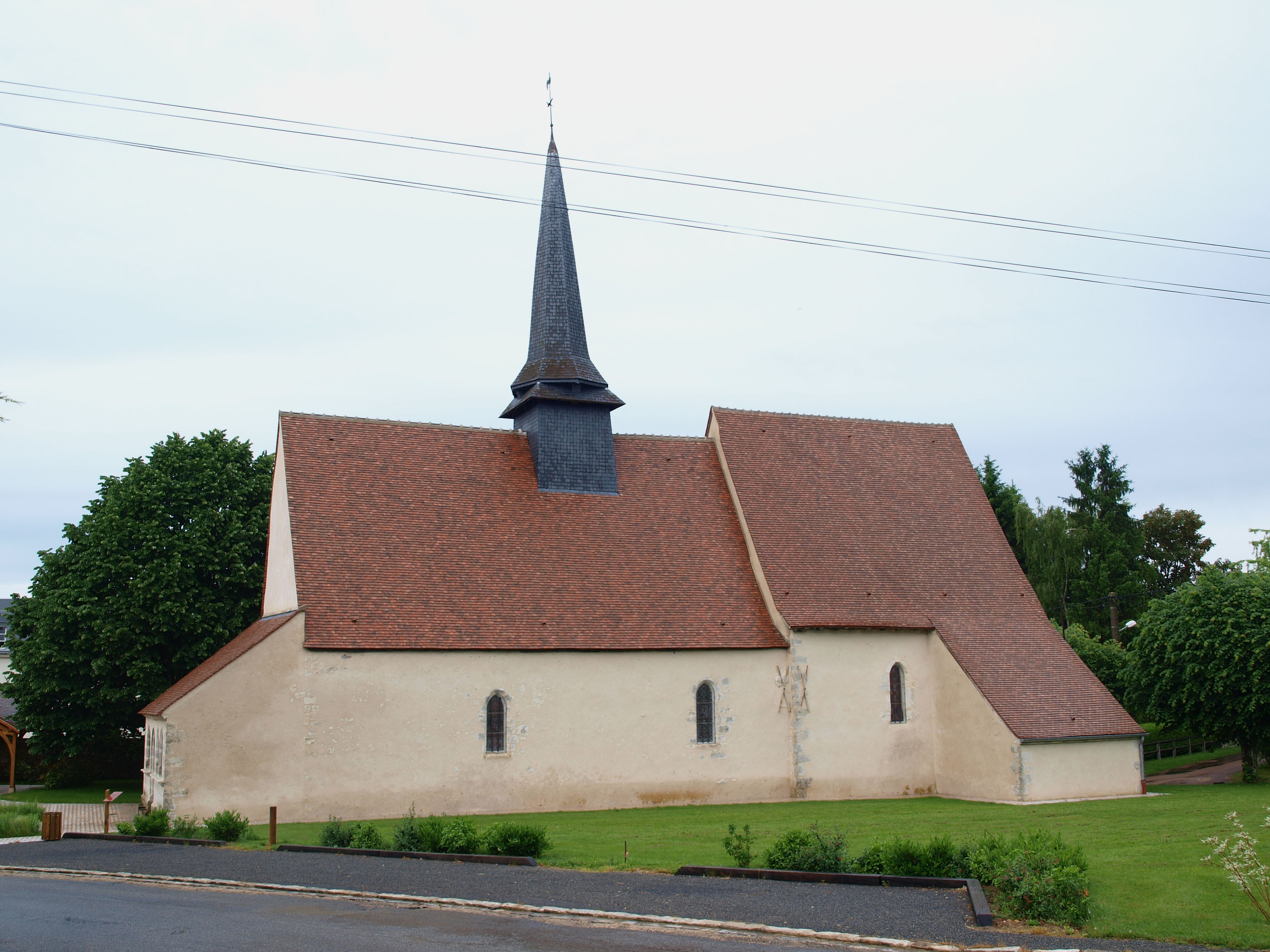 Courtemaux (Loiret, France) ; église